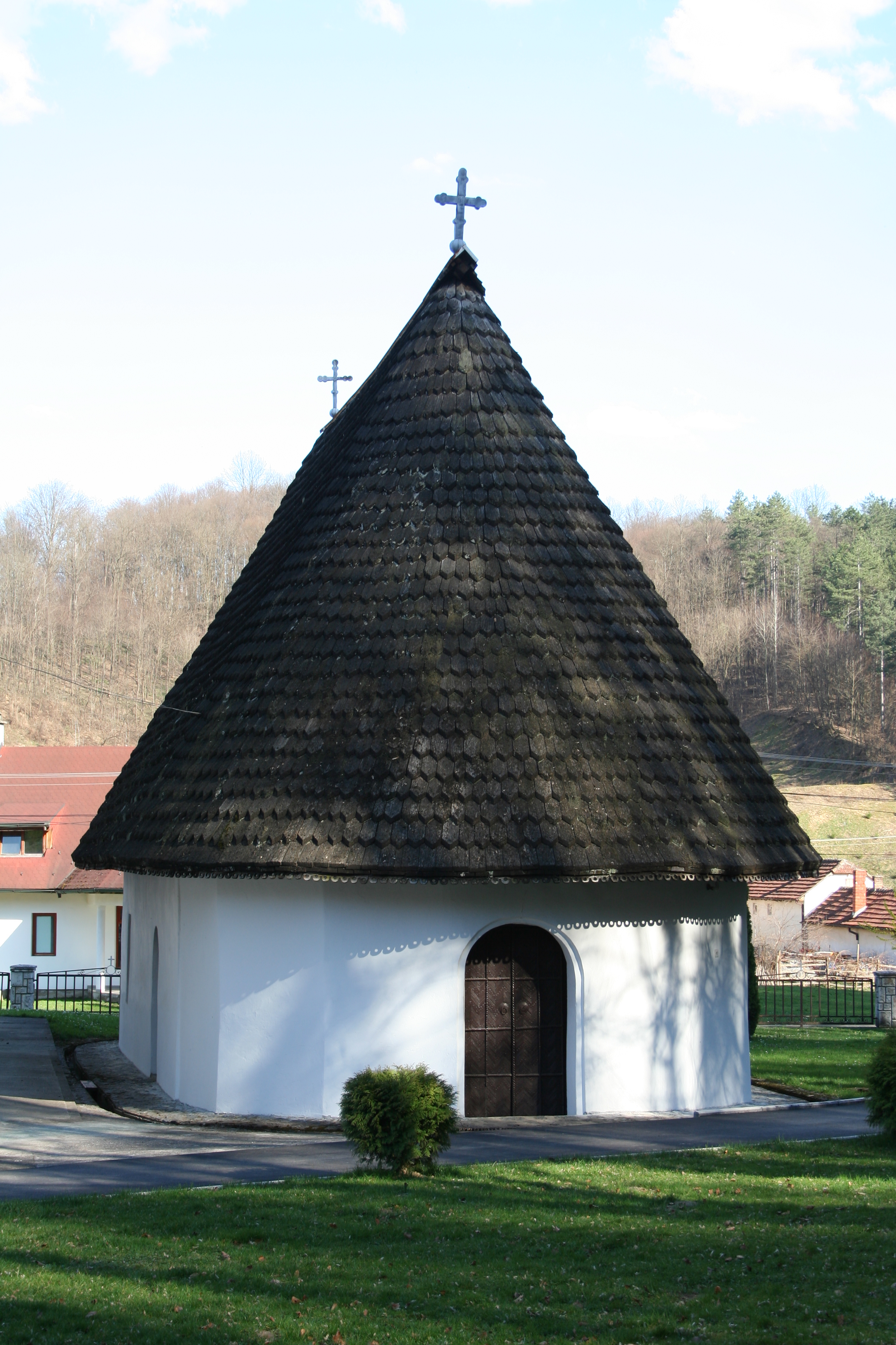 Crkve i spomen kosturnica